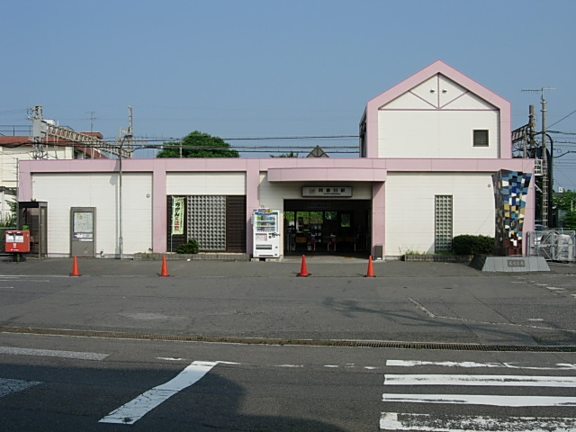 阿倉川駅